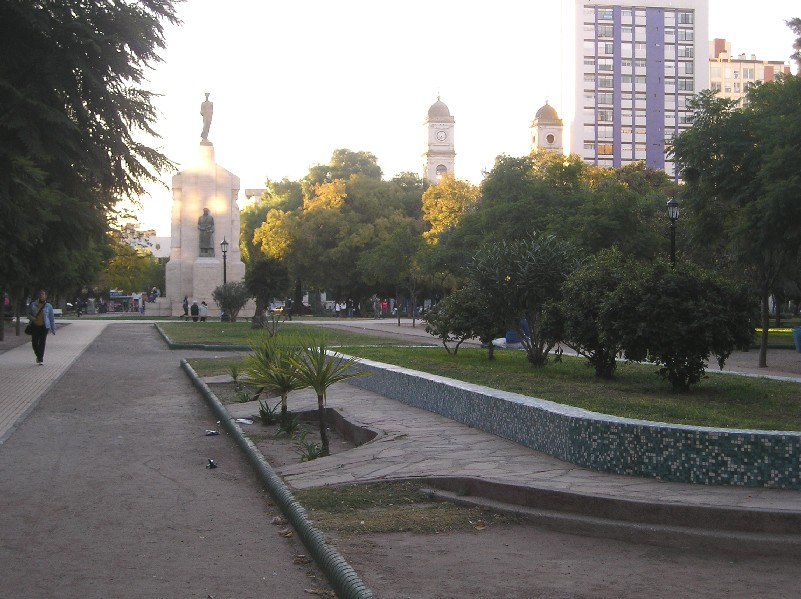 Plaza Rivadavia, Bahía Blanca, Provincia de Buenos Aires, Argentina.